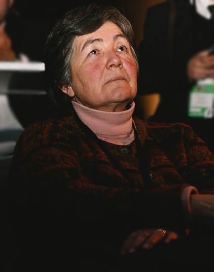 Viviana Díaz, activista chilena.